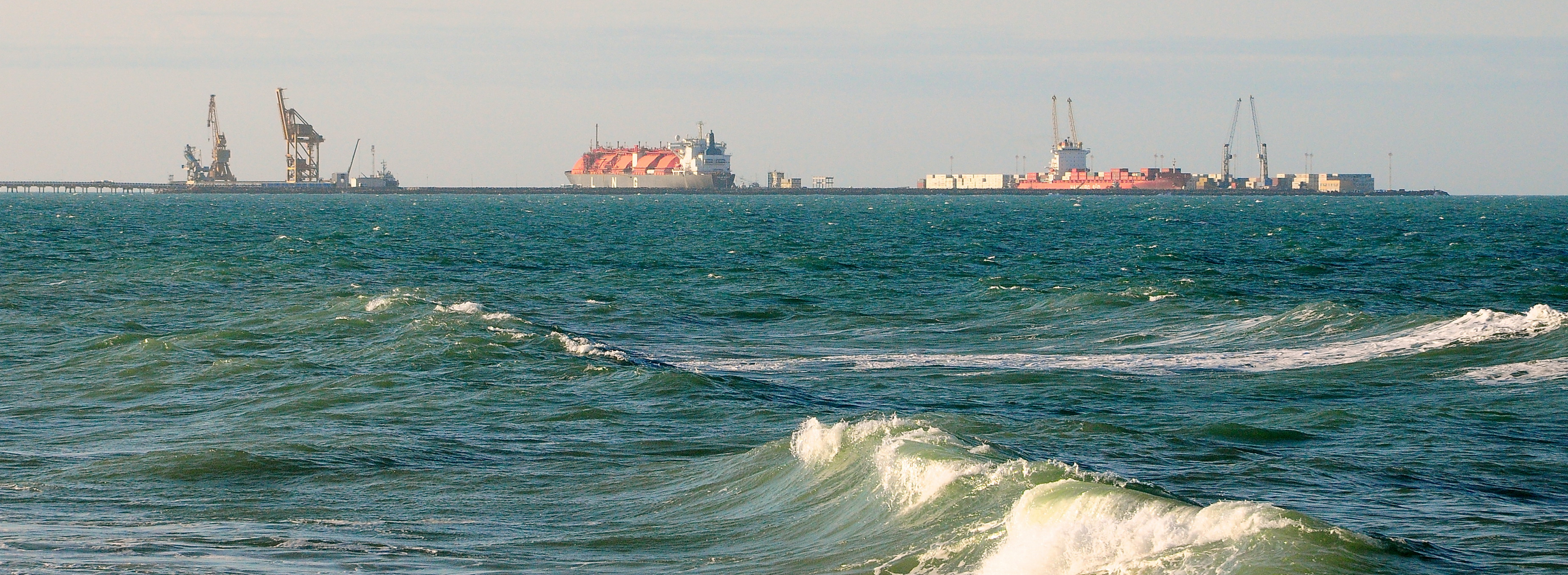 Foto tirada no âmbito do pecém/ce